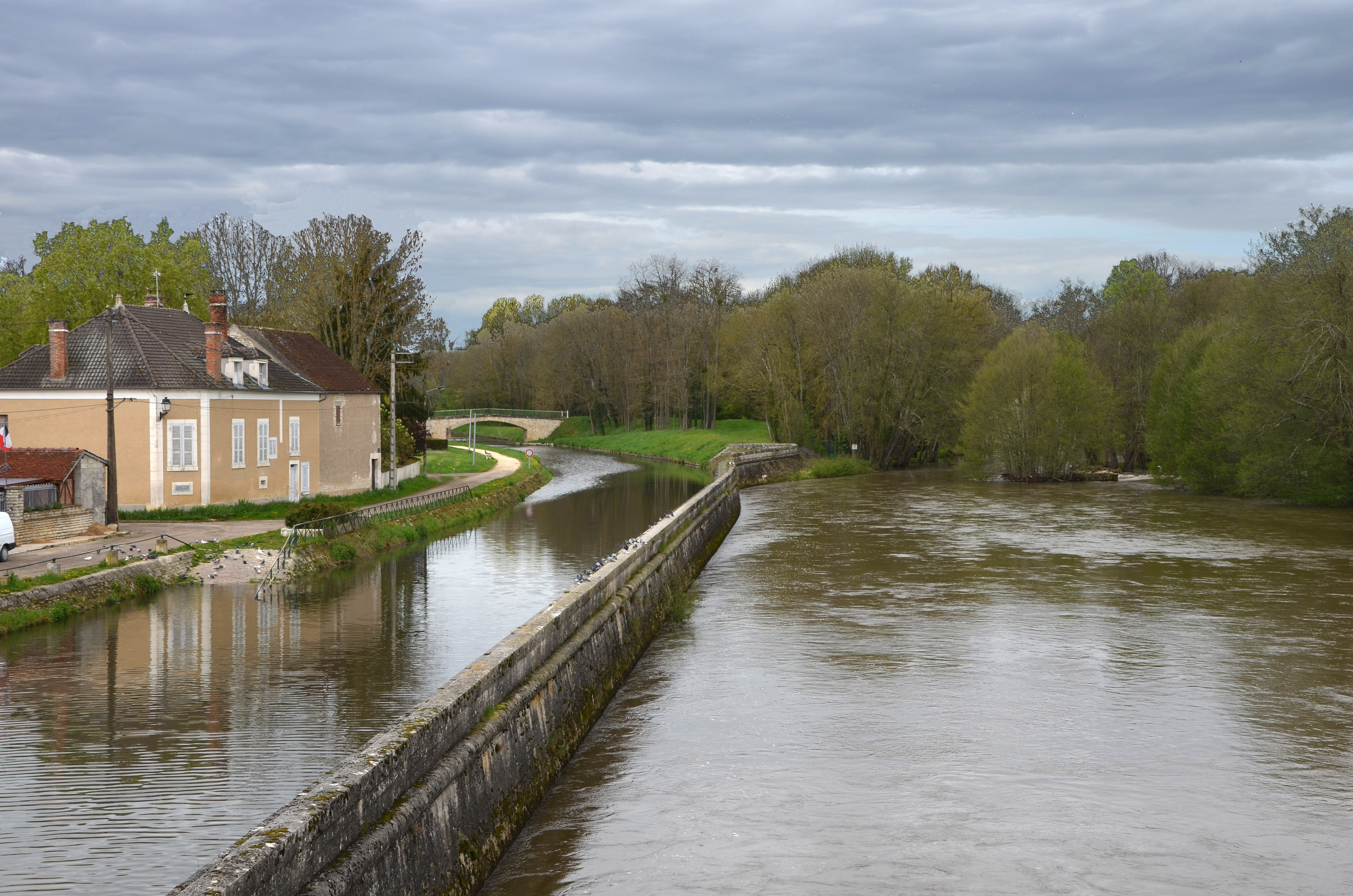 La Cure et le canal d'Accolay à Accolay, Yonne, France